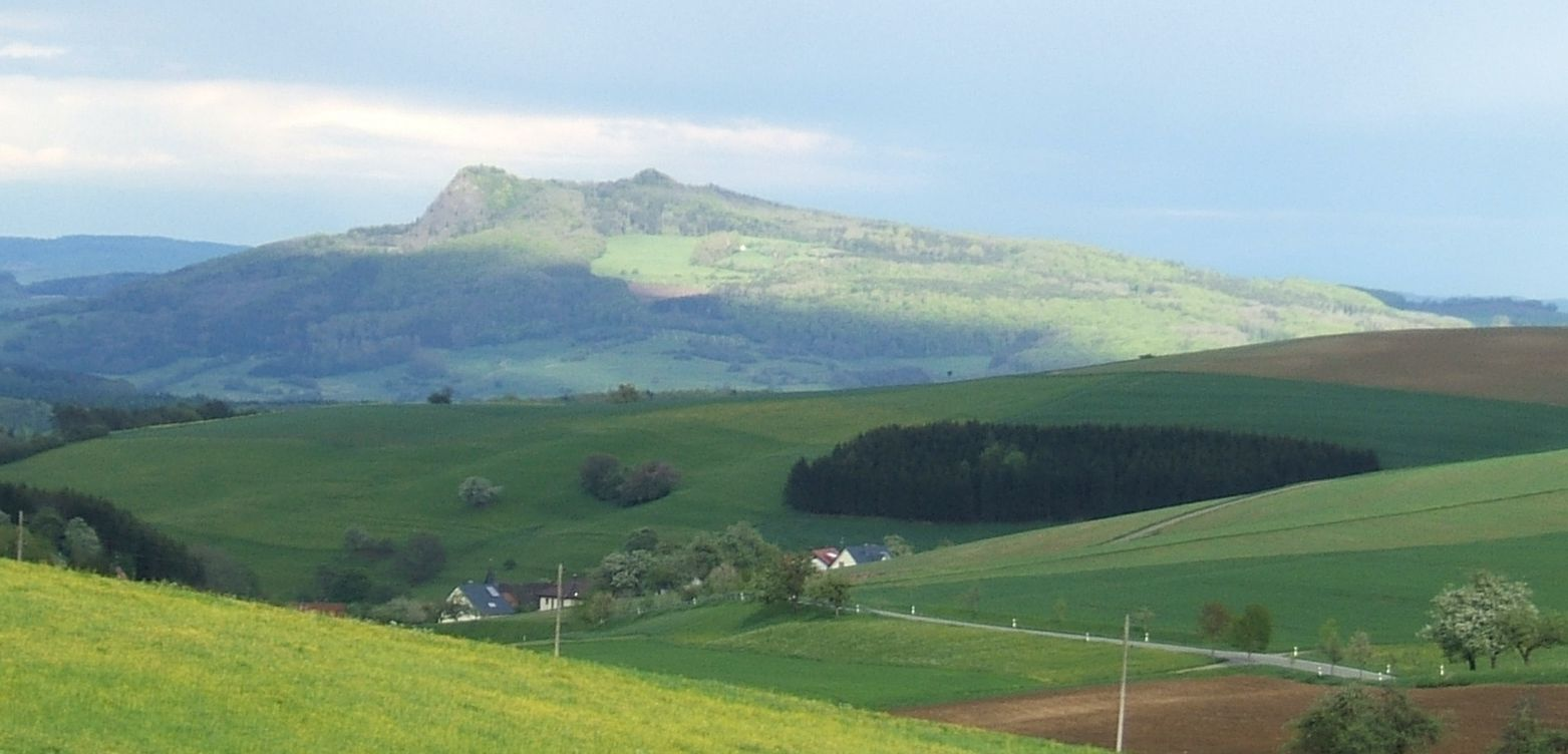 Der Hohenstoffeln von Westen. Im Vordergrund das Dorf Nordhalden, ein Stadtteil von Blumberg; Baden-Württemberg.